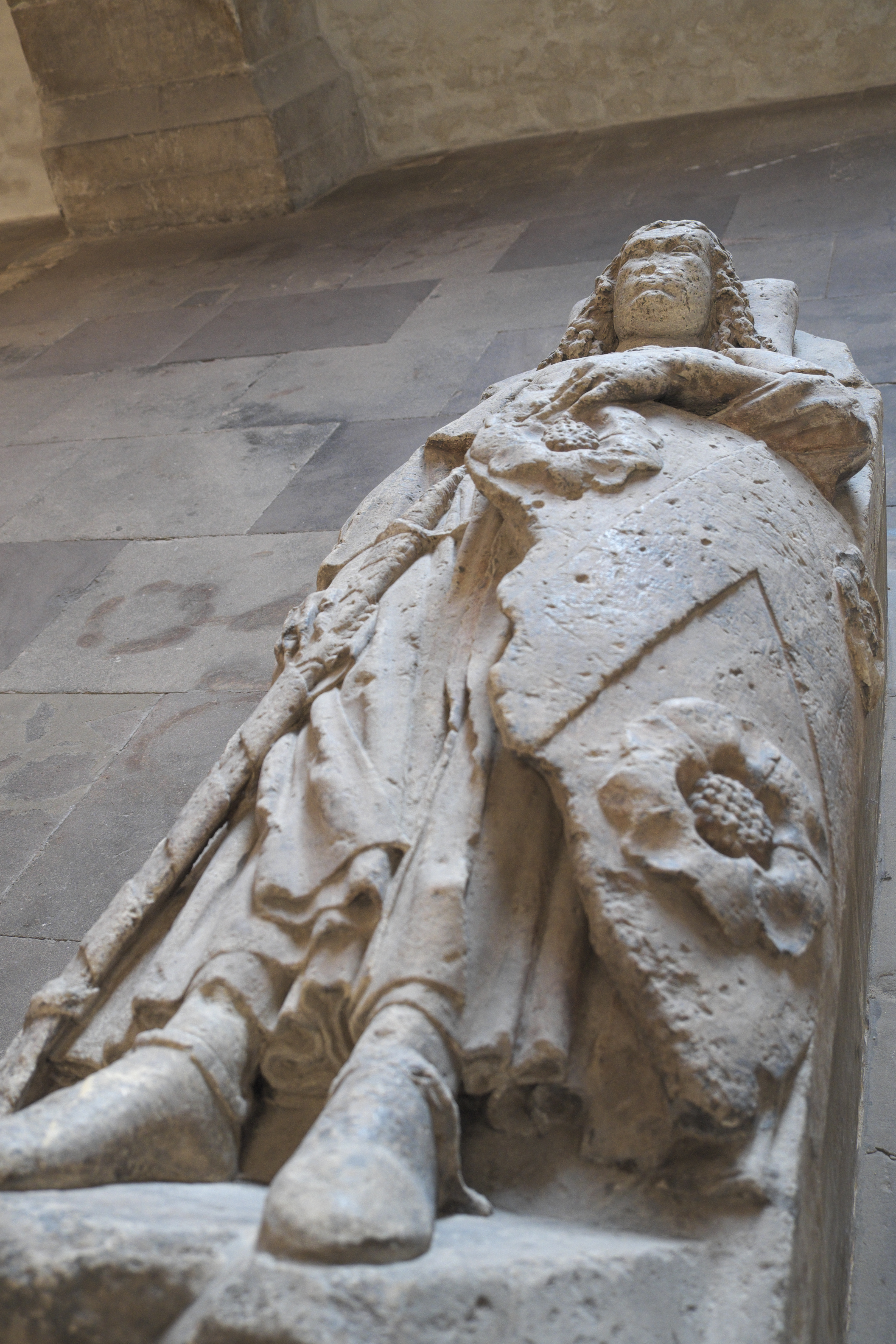 Dom St. Johannes und St. Laurentius in Merseburg im Saalekreis in Sachsen-Anhalt/Deutschland, Grabmal des Ritters Hermann von Hagen (Hain) aus der Mitte des 13. Jahrhunderts